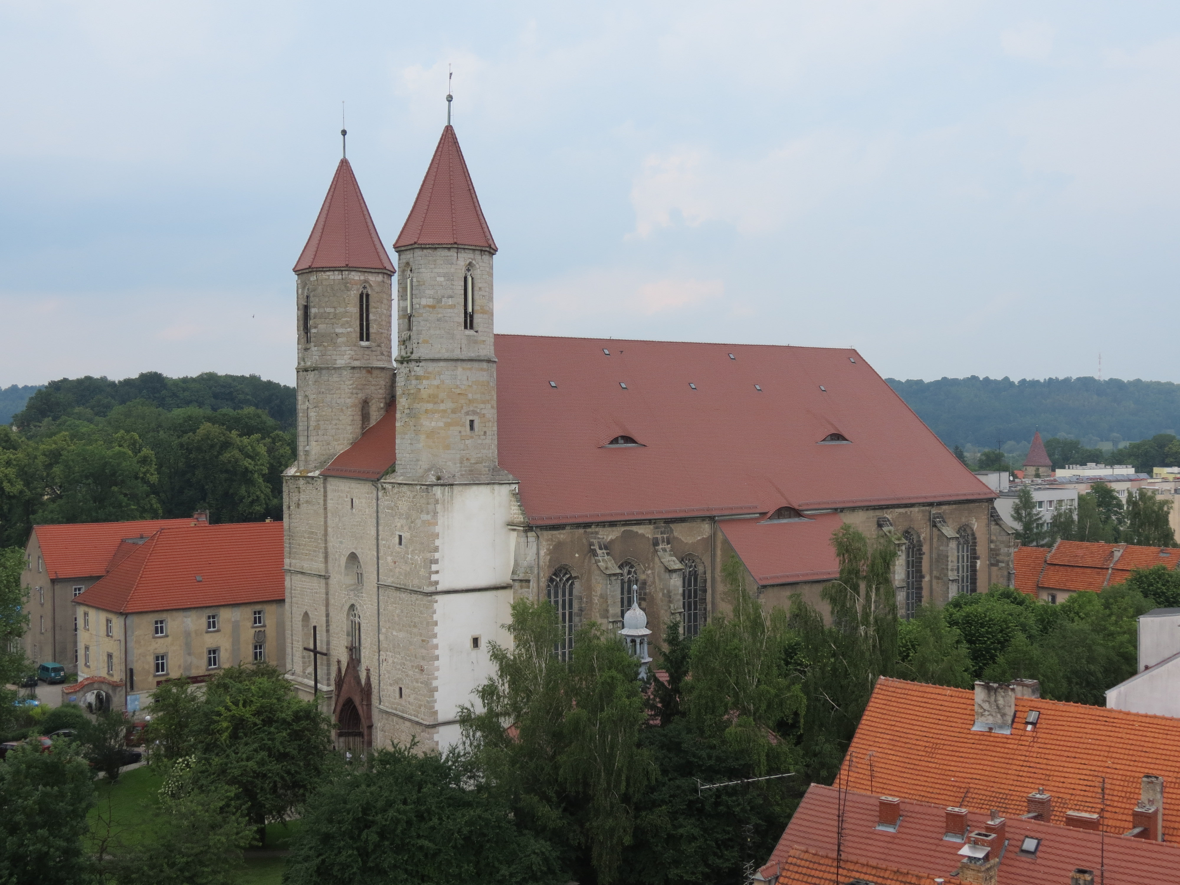 Lwówek Śląski, kościół par. p.w. Wniebowzięcia NMP, ok. 1300, XVI